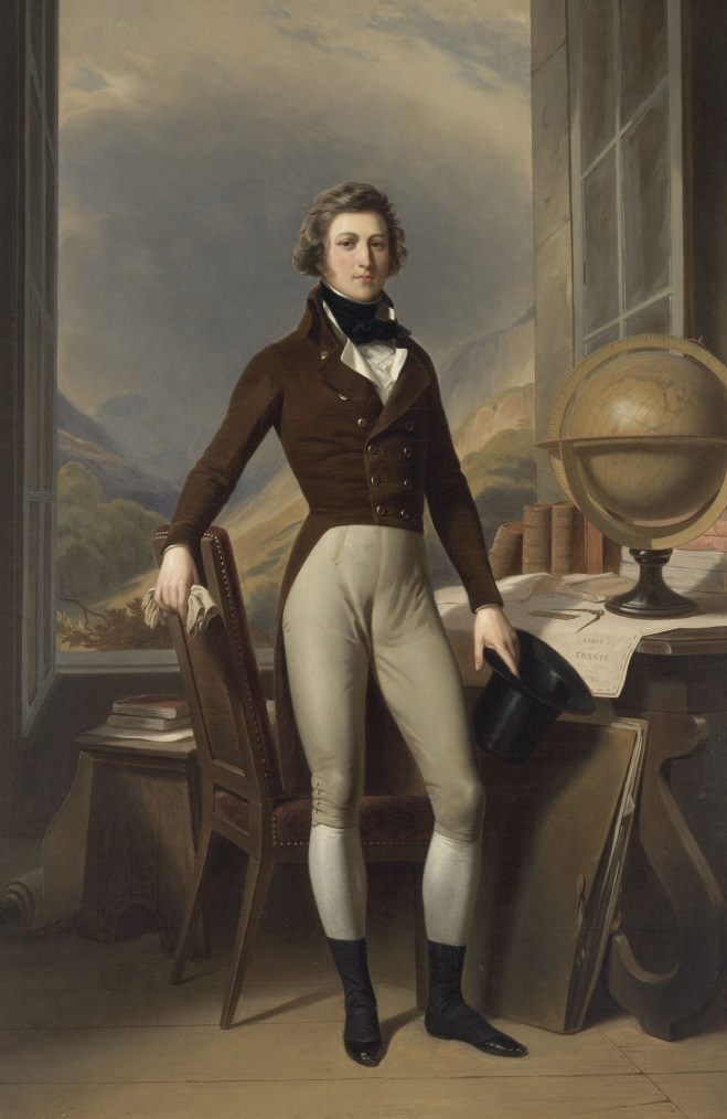 Copie d'après un original de Couder disparu en 1848